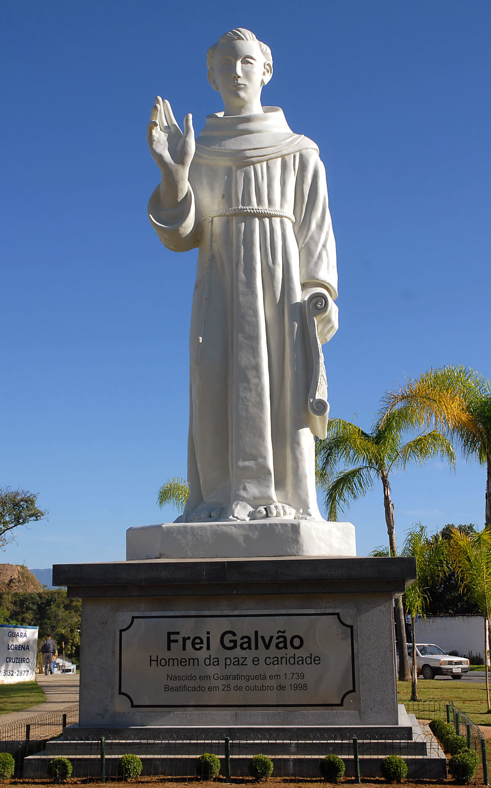 Estátua de Frei Galvão em sua cidade natal, Guaratinguetá, São Paulo, Brasil.